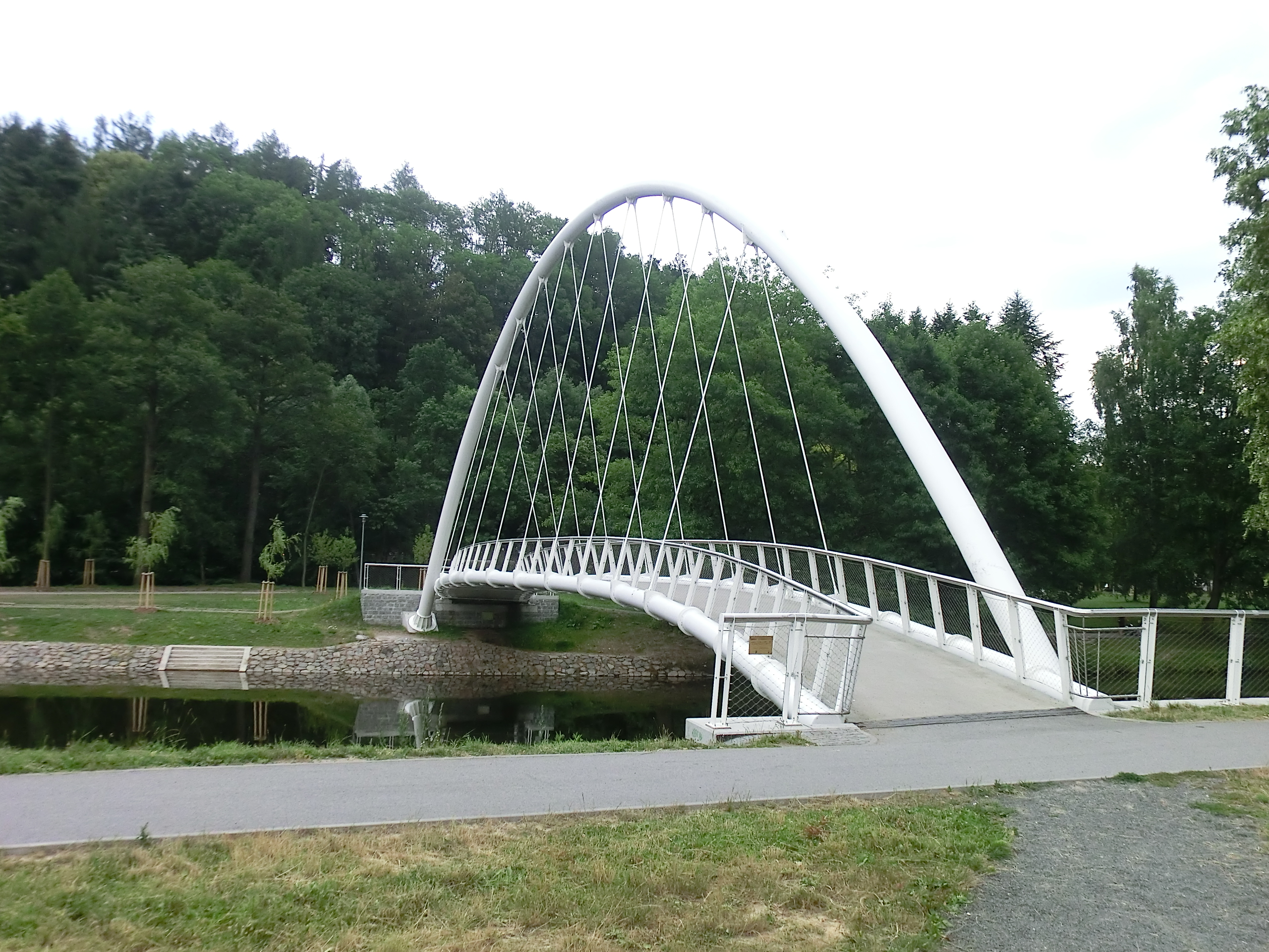 Cykloturistická lávka, spojující park na Ostrově se sídlištěm Řeky, vznikla v letech 2012-2013 jako součást budované cyklotrasy podél Jizery.